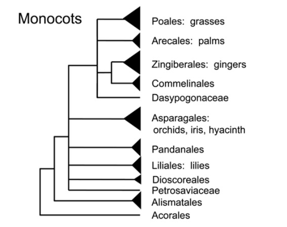 Árvore filogenética das acrogimnospermas. Gnetaceae